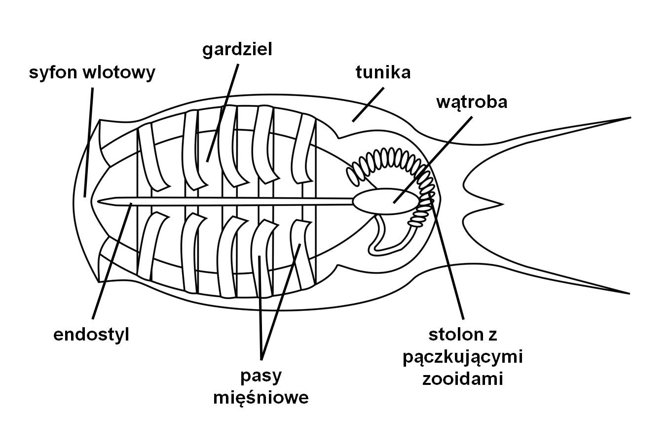 Schematyczne przedstawienie osobniczej salpy